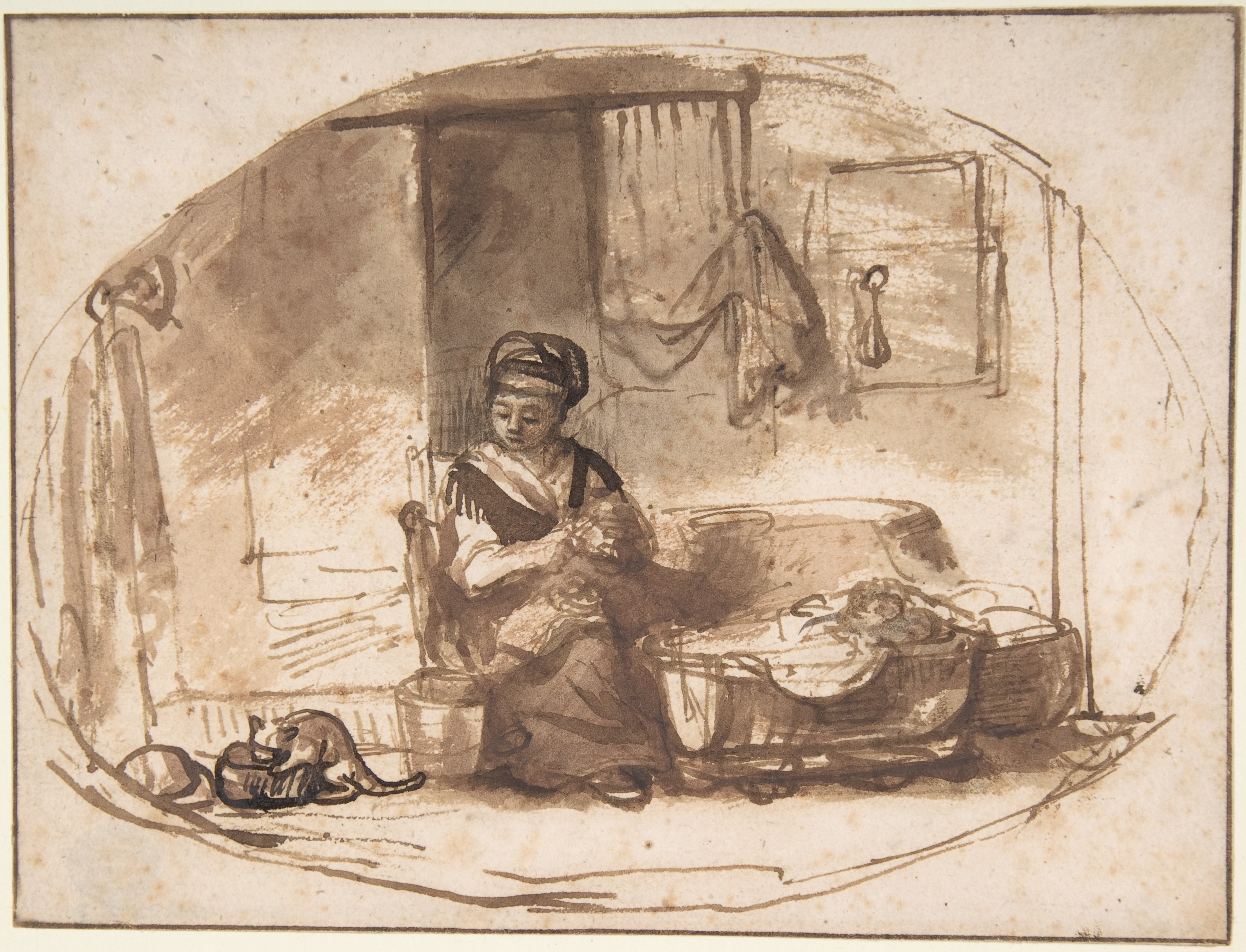 Drawing; Drawings